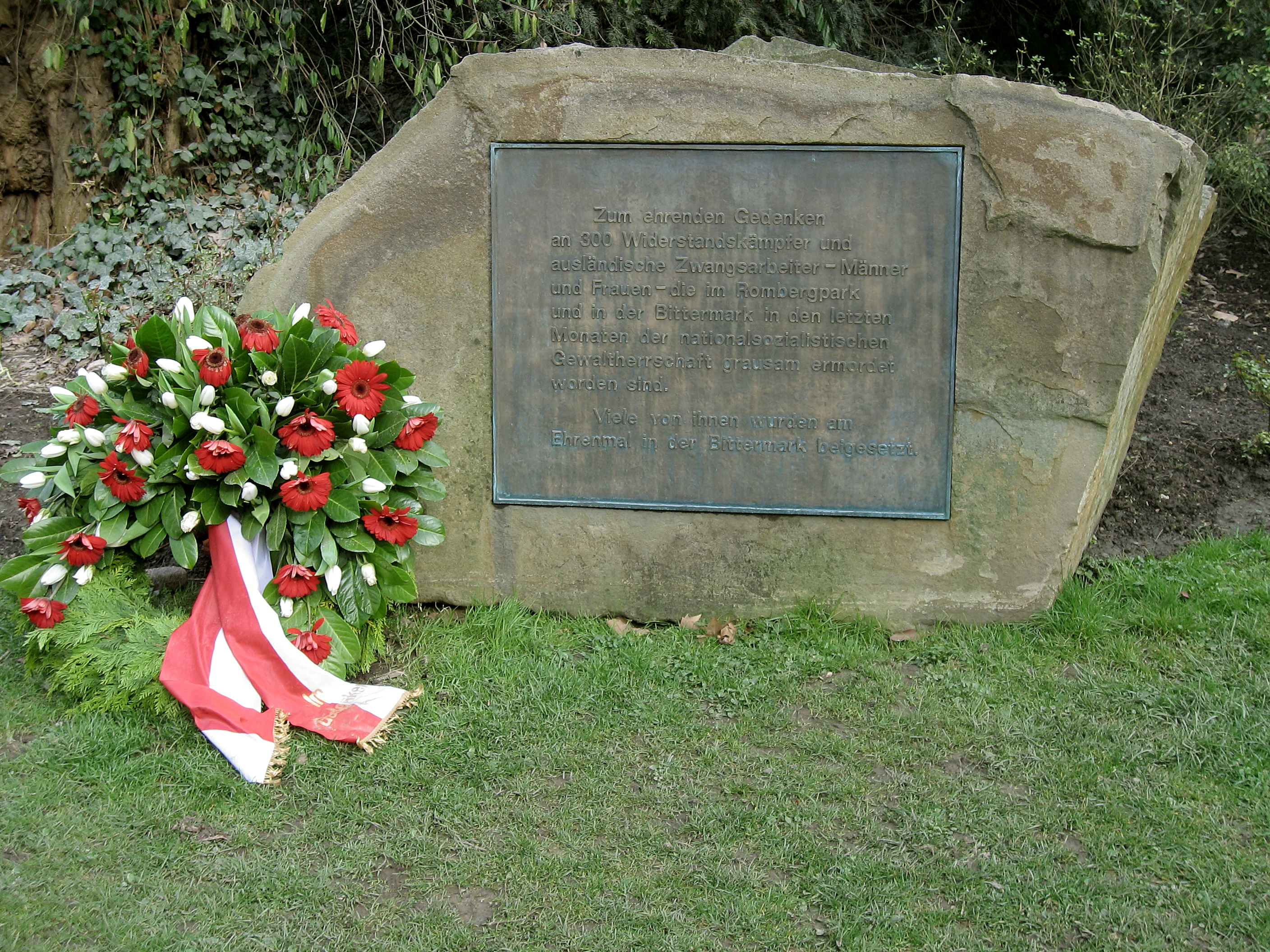 Dortmund, Brünninghausen, Rombergpark, Gedenkstein, Kranz 2008